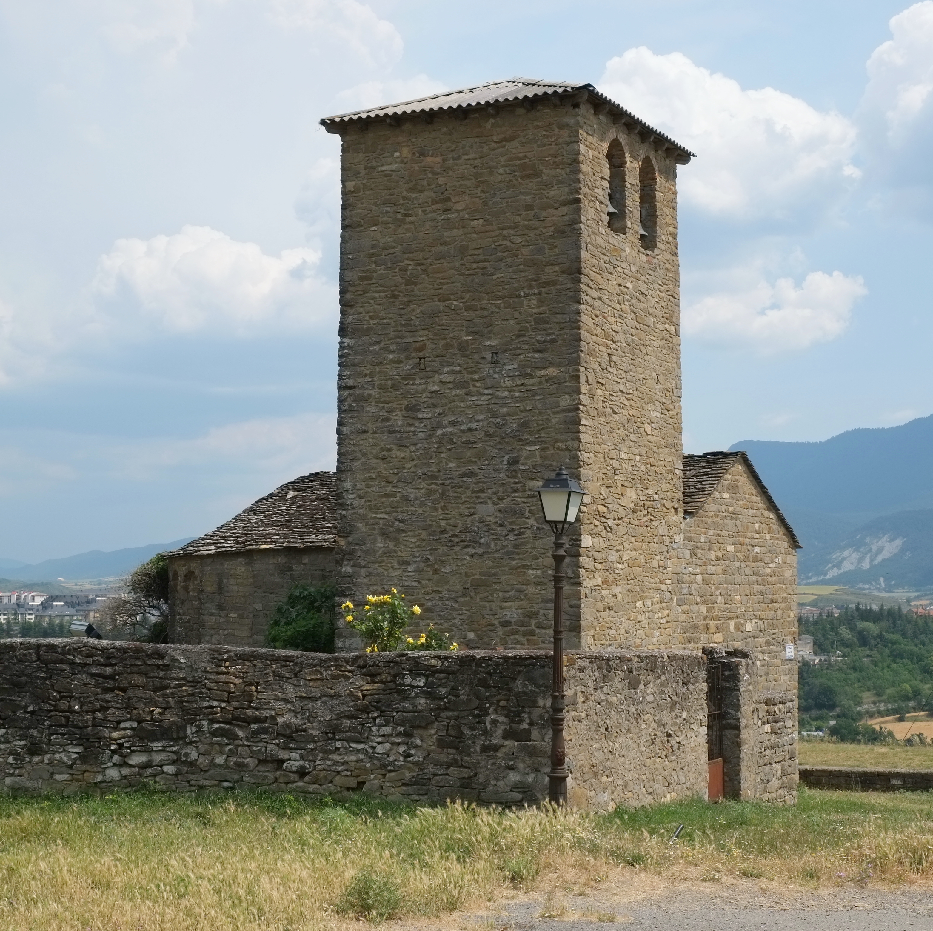 Kirche San Andrés in Asiesoal in der Provinz Huesca in Aragonien (Spanien)